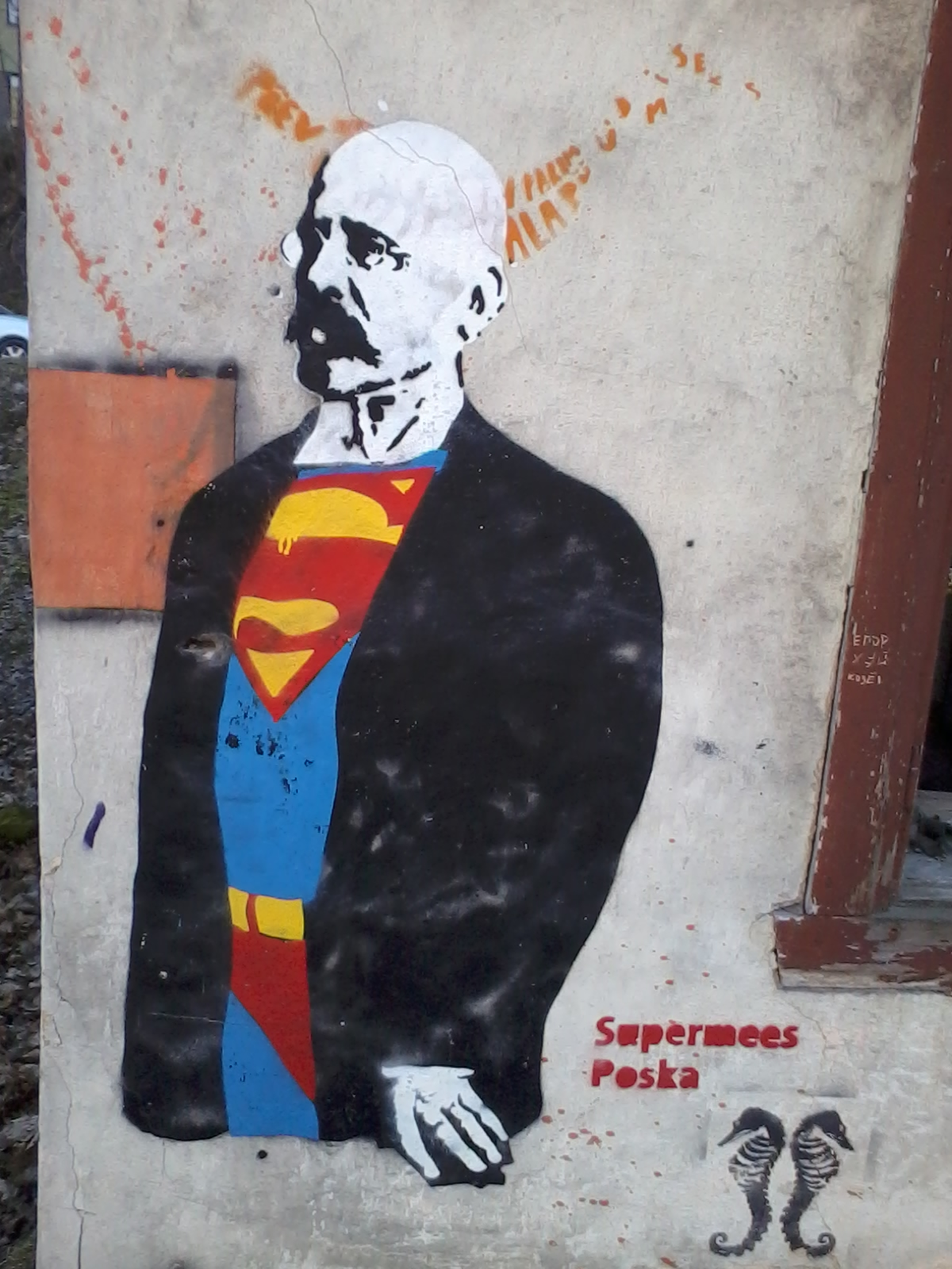 "Supermees Poska" - Jaan Poskat kujutav grafiti Tartus